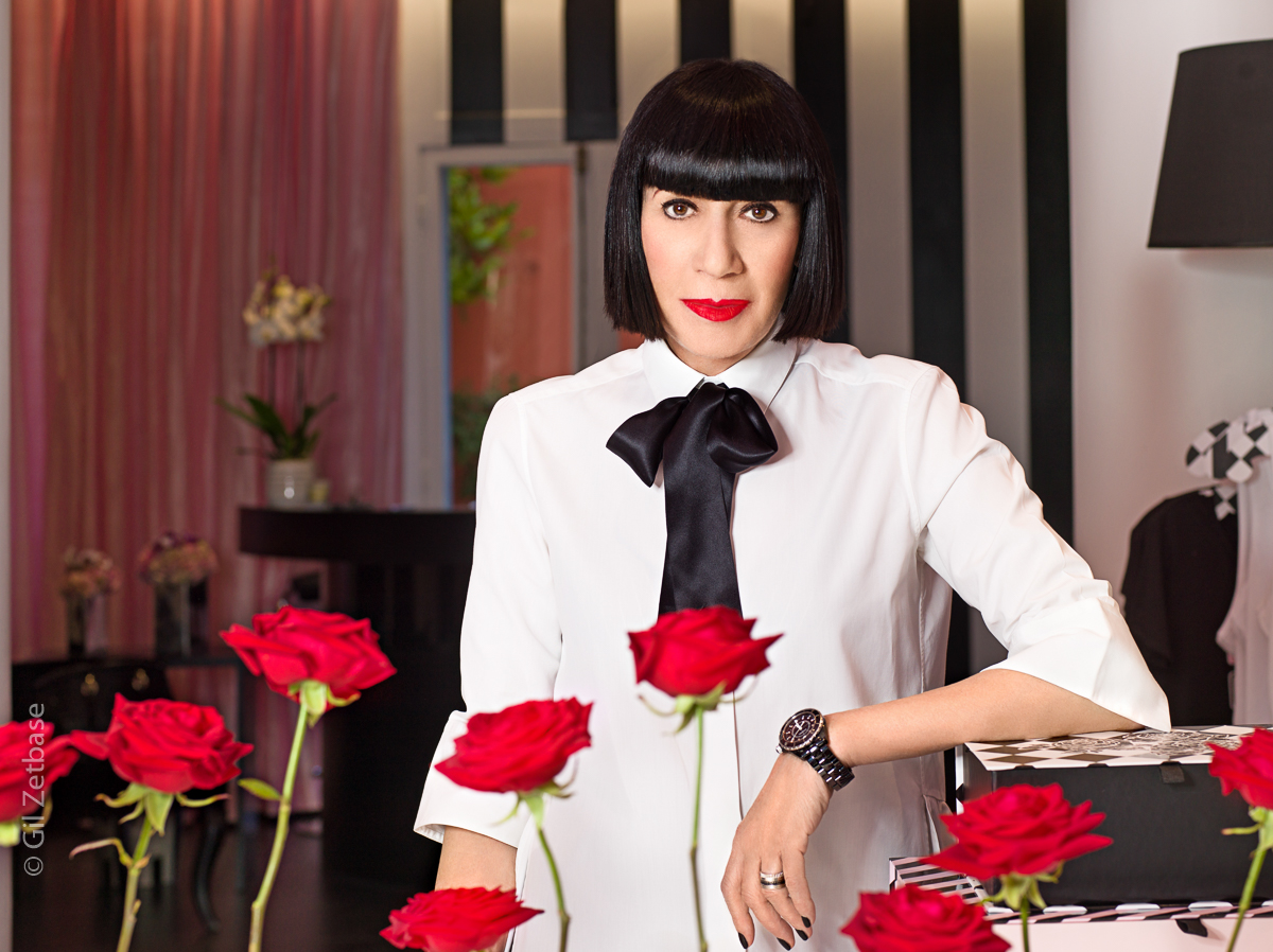 Chantal Thomas dans sa boutique éphémère de Monaco photographiée par Gil Zetbase